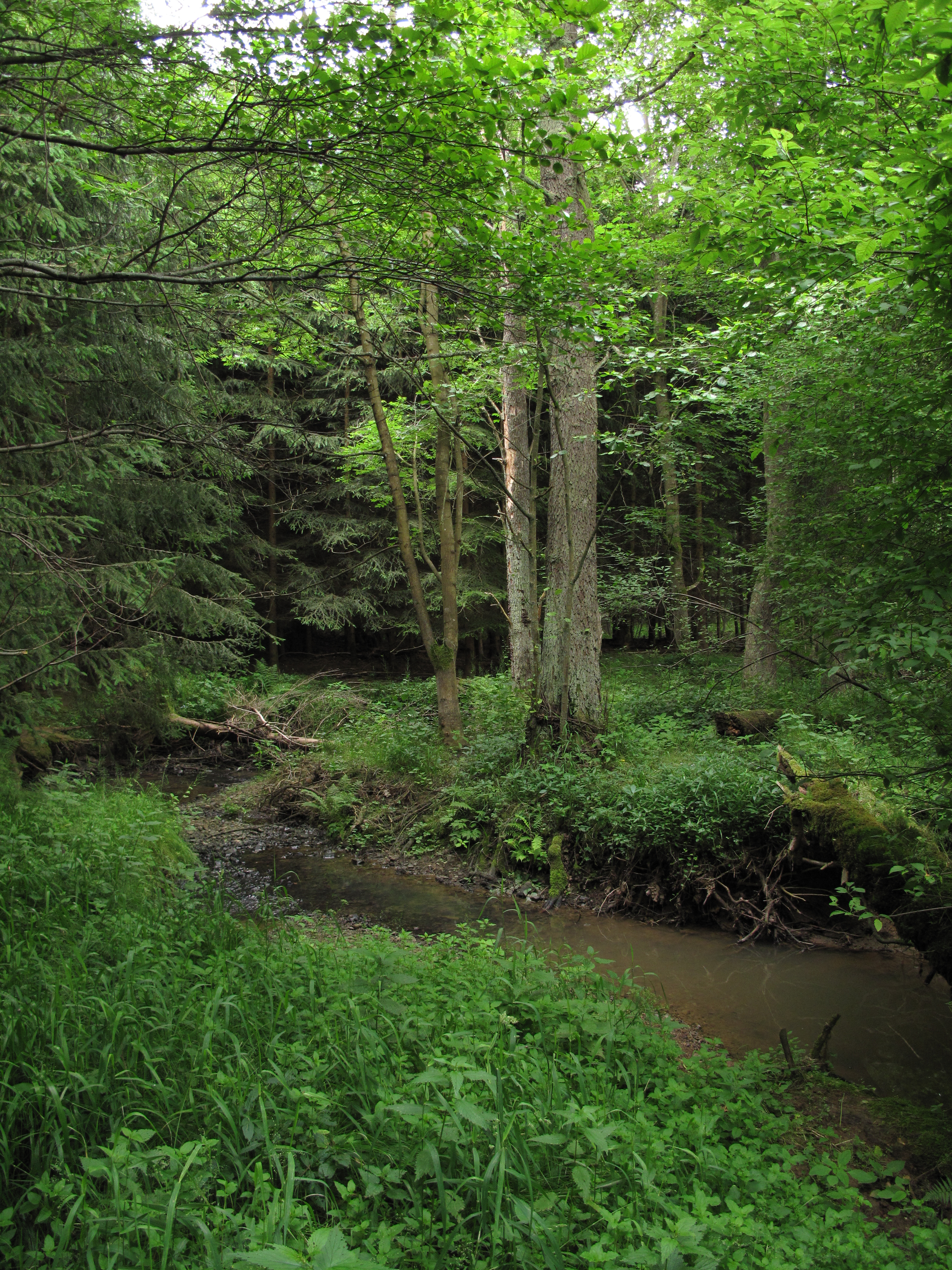 Potok Chejlava v lese. Okres Rokycany, Česká republika.